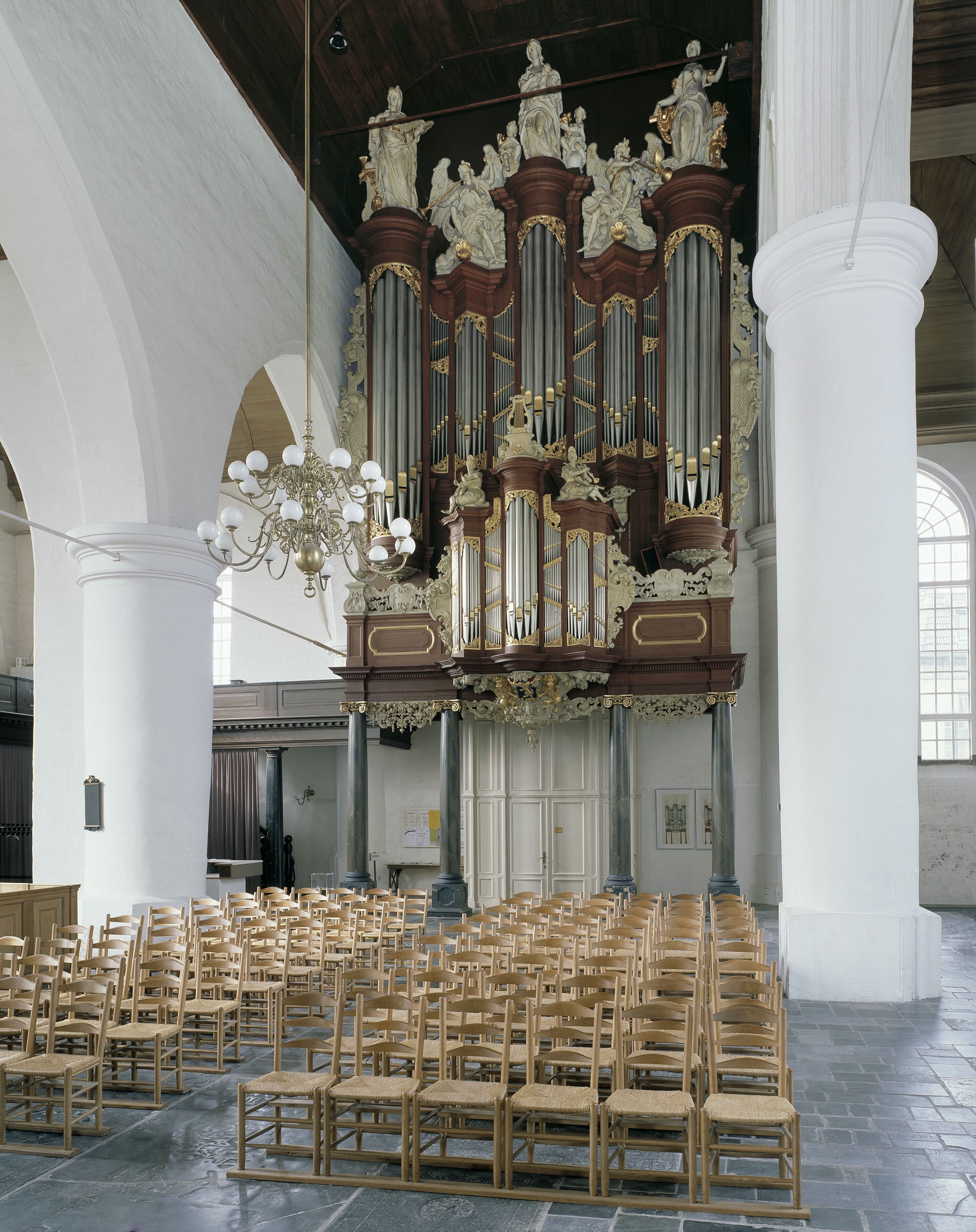 Hervormde Grote of Jacobijnerkerk: Interieur, aanzicht orgel, orgelnummer 841 (opmerking: Gefotografeerd voor Het Historische Orgel in Nederland 1726-1769, bladzijde 44)